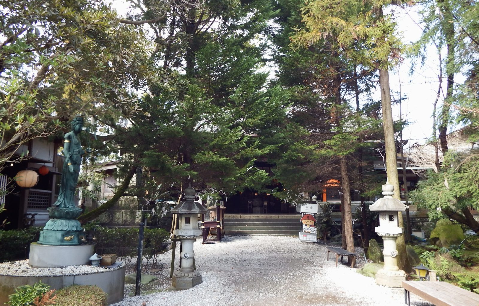 霊山寺の本堂